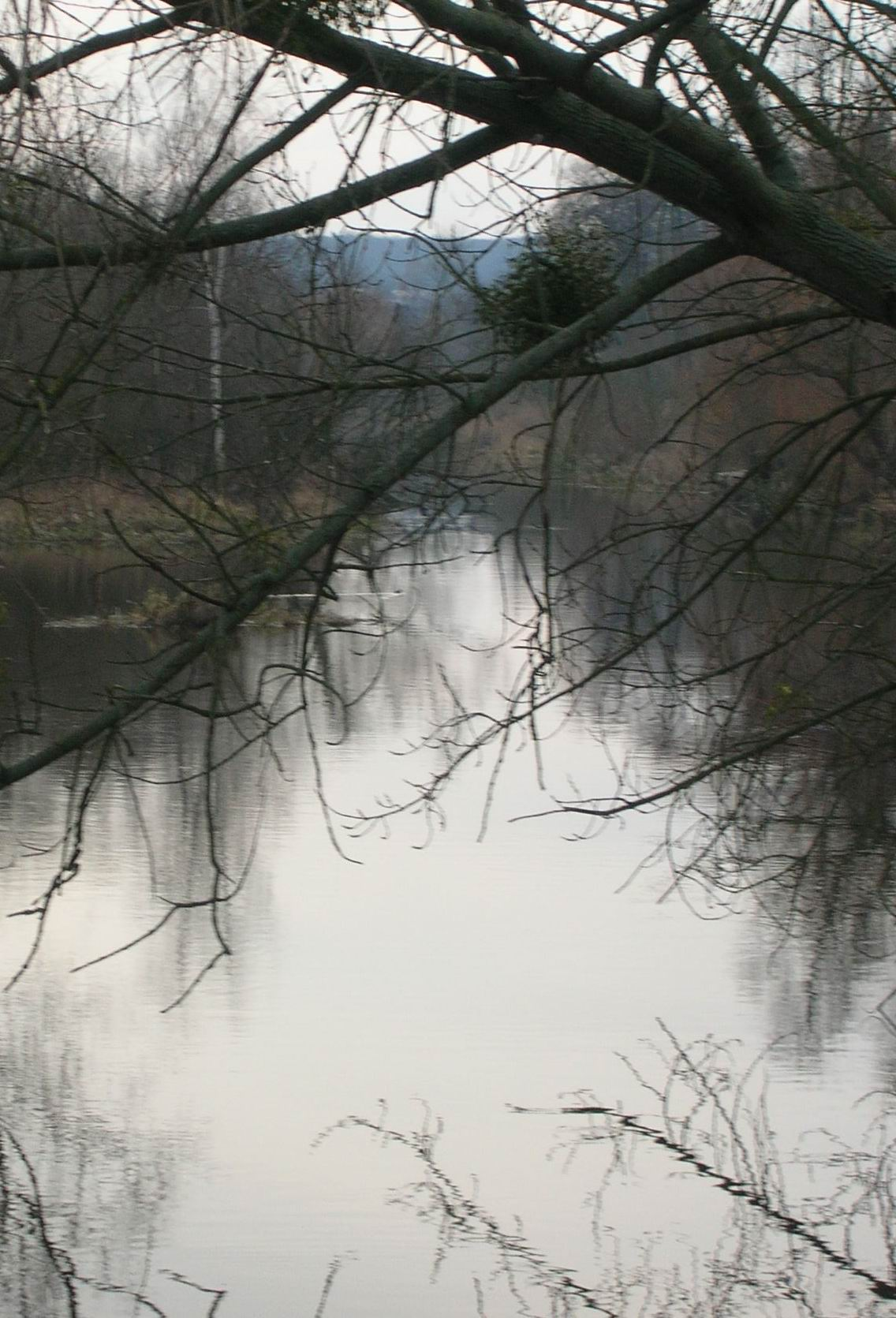 The Łarpia River in Police, a town in Pomerania, Poland / Odnoga Odry - Łarpia w Policach, Pomorze Zachodnie